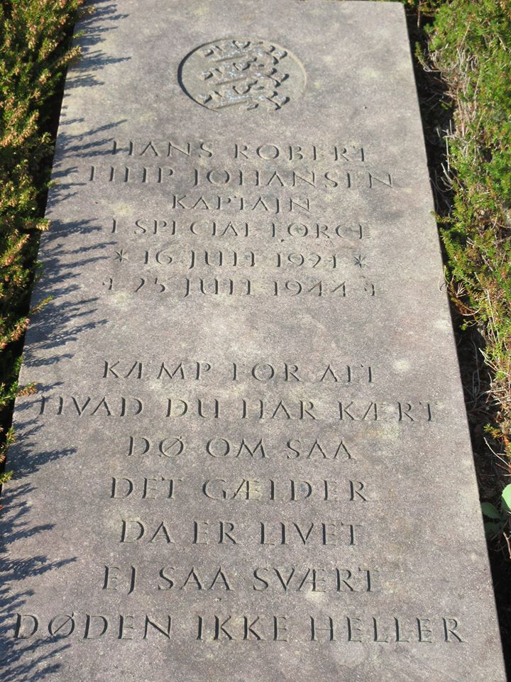 Hans Robert Filip Johansen var en dansk kaptajn i det britiske Special Operations Executive (S.O.E.) og aktiv instruktør og modstandmand i Danmark 1943-44. Han begik selvmord i 1944 i forbindelse med en arrestation af Schalburgkorpset. Hans Johansen blev i første omgang begravet på Bispebjerg Kirkegård, men blev i 1945 overført til Det Store Gravfelt i Mindelunden i Ryvangen.